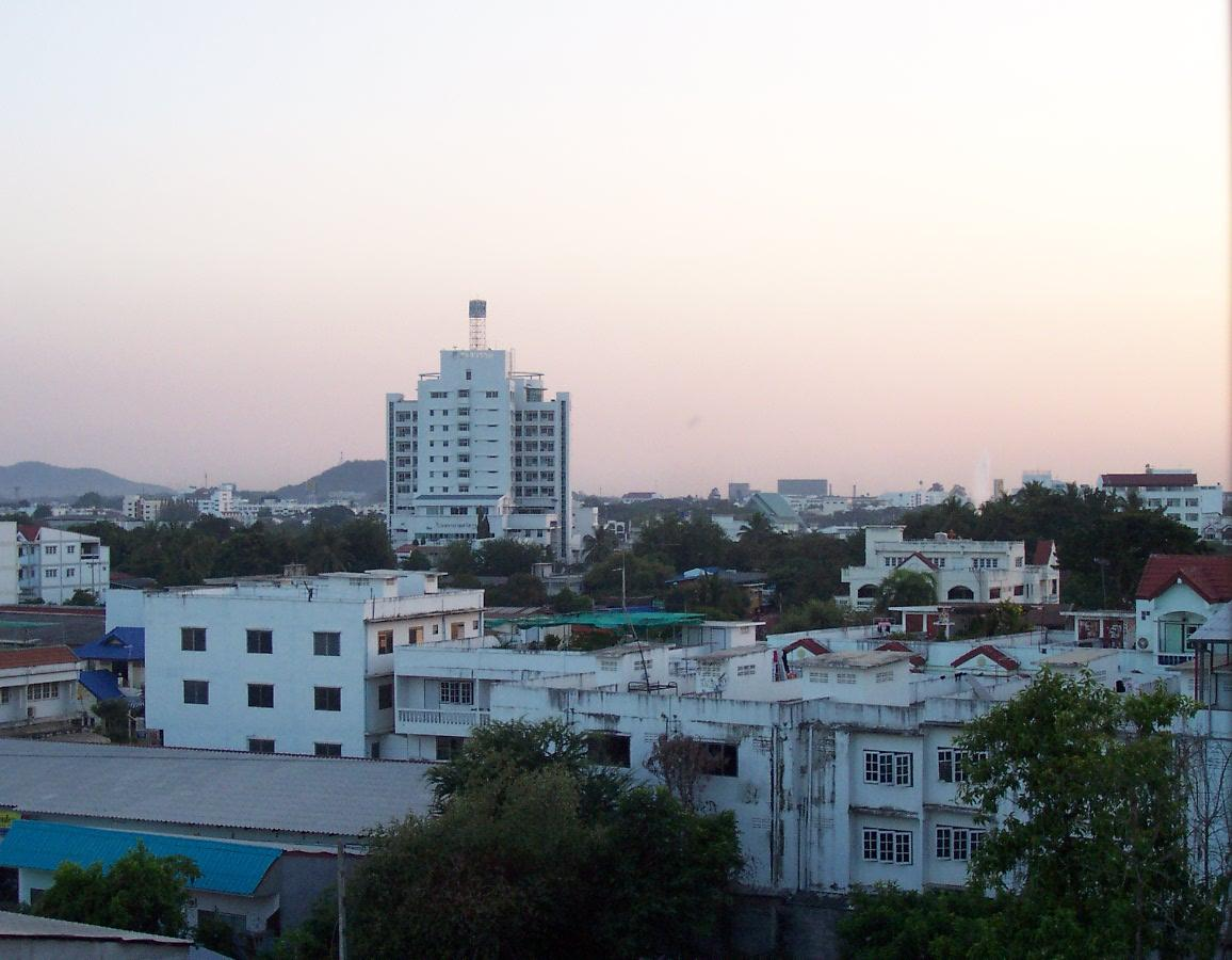 Nakhonsawan town (อำเภอเมืองนครสวรรค์ จังหวัดนครสวรรค์)